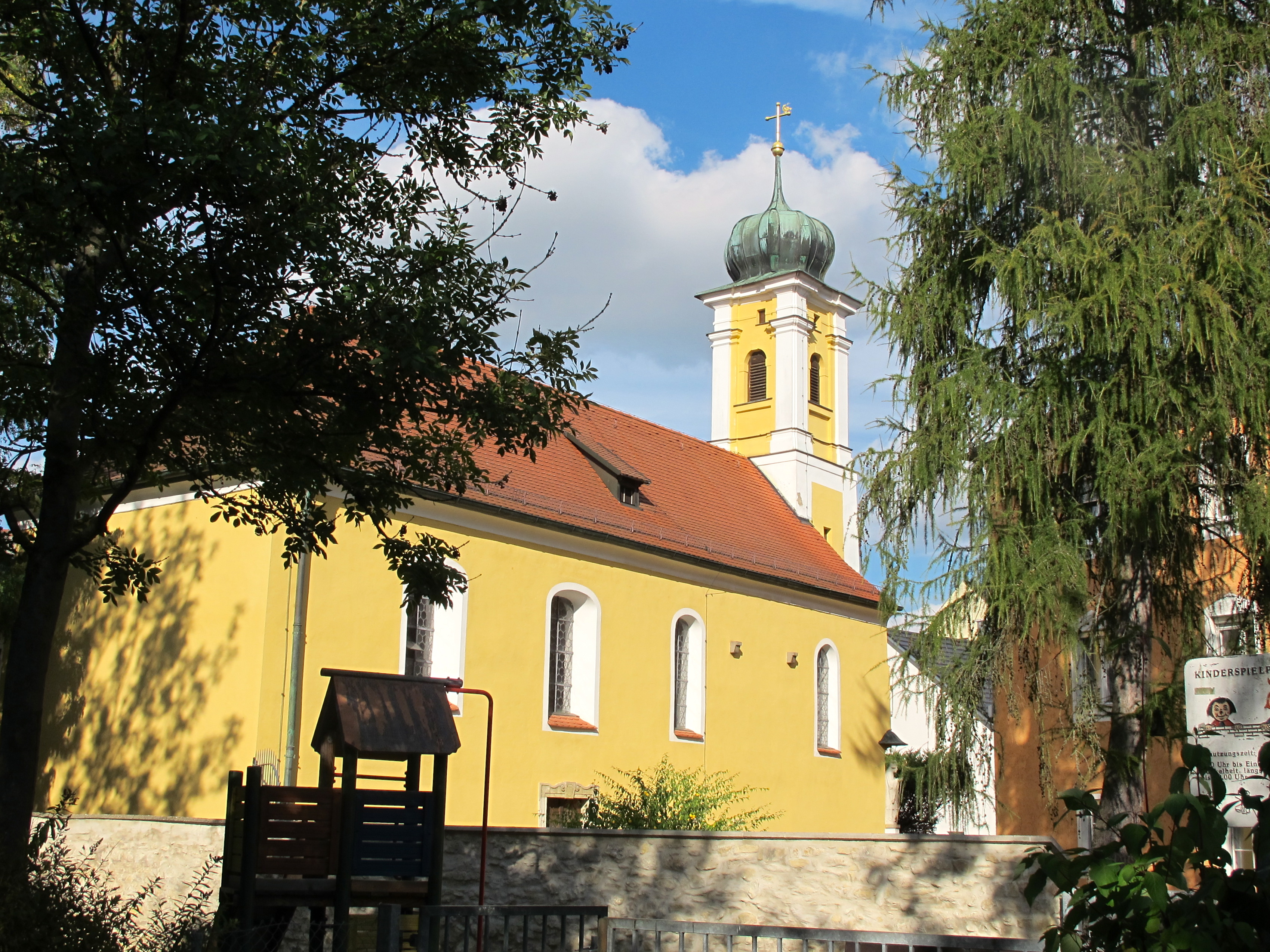 Ehem. Sondersiechen- und Nebenkirche St. Nikolaus in ReinhausenThis is a photograph of an architectural monument.